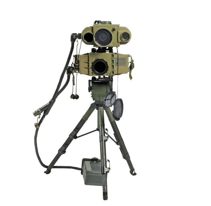 Zdjęcie nowoczesnego dalmierza laserowego English | polski | +/−